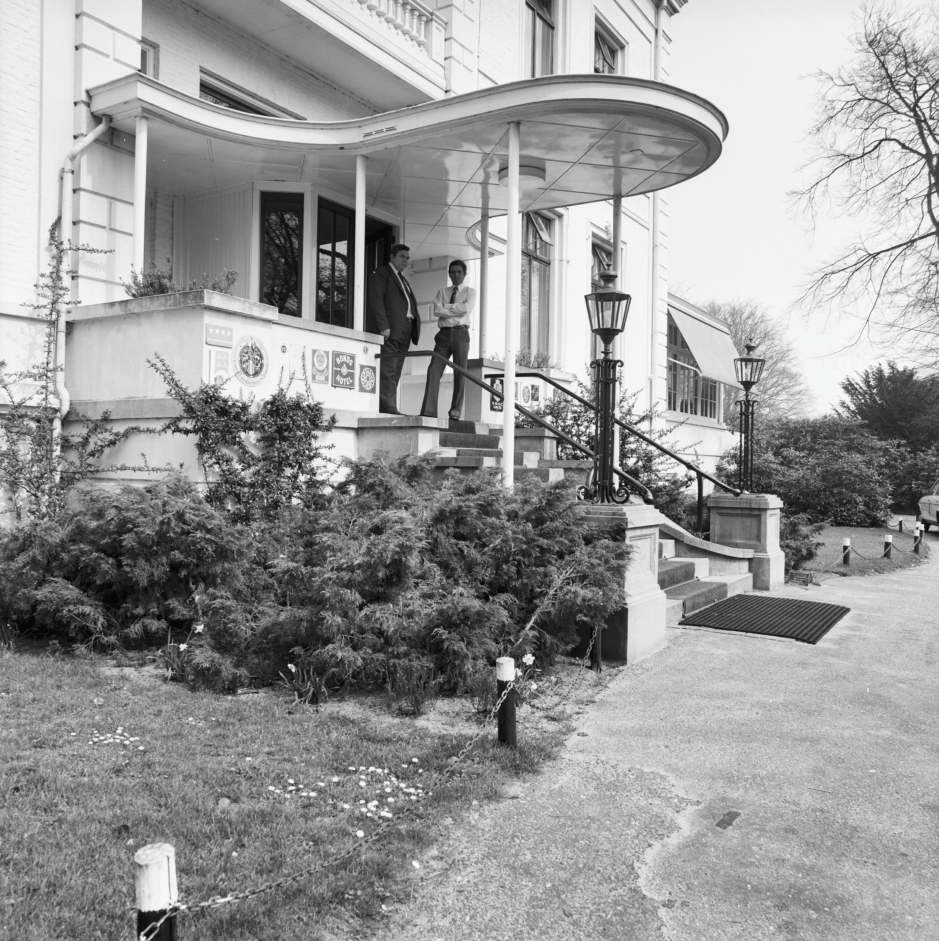 Huis Lauswald: ingang achtergevel